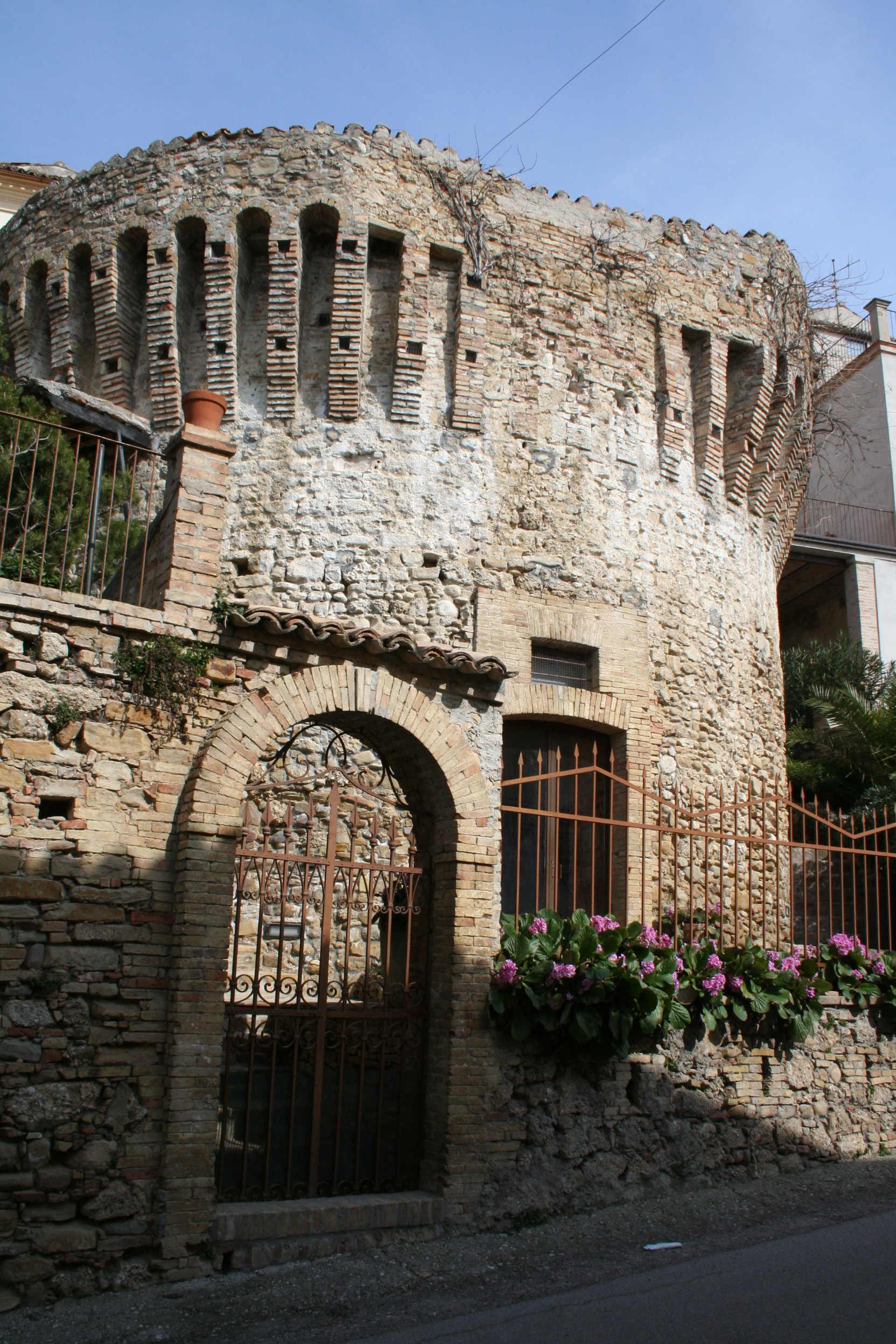 Torrione di Canzano, costruzione fortificata a pianta circolare, del XV secolo, che si eleva all’interno dell’incasato del paese.